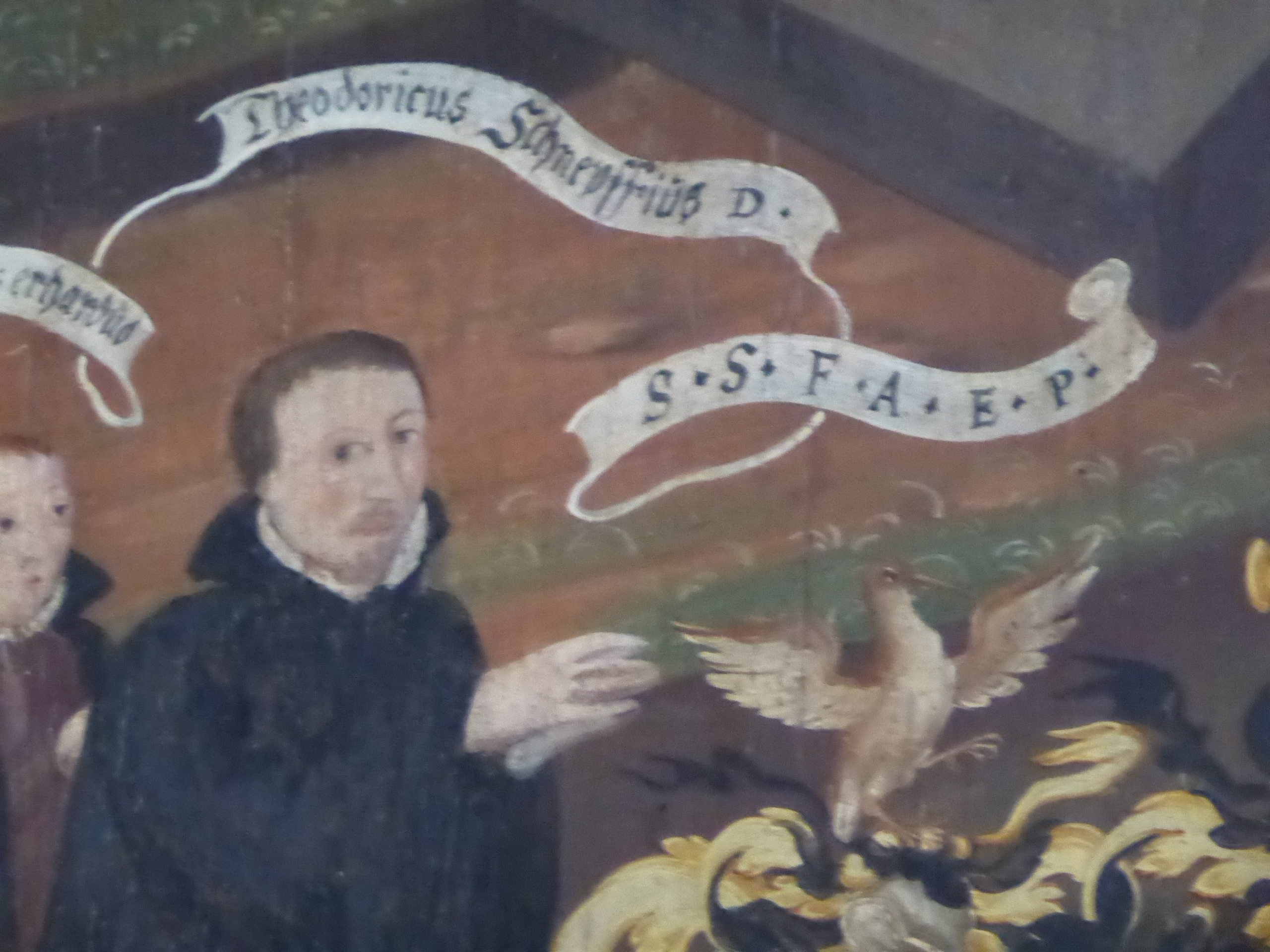 Epitaph der Familie Schnepf in der Stiftskirche Tübingen, Detail: Dietrich (Theodorich) Schnepf